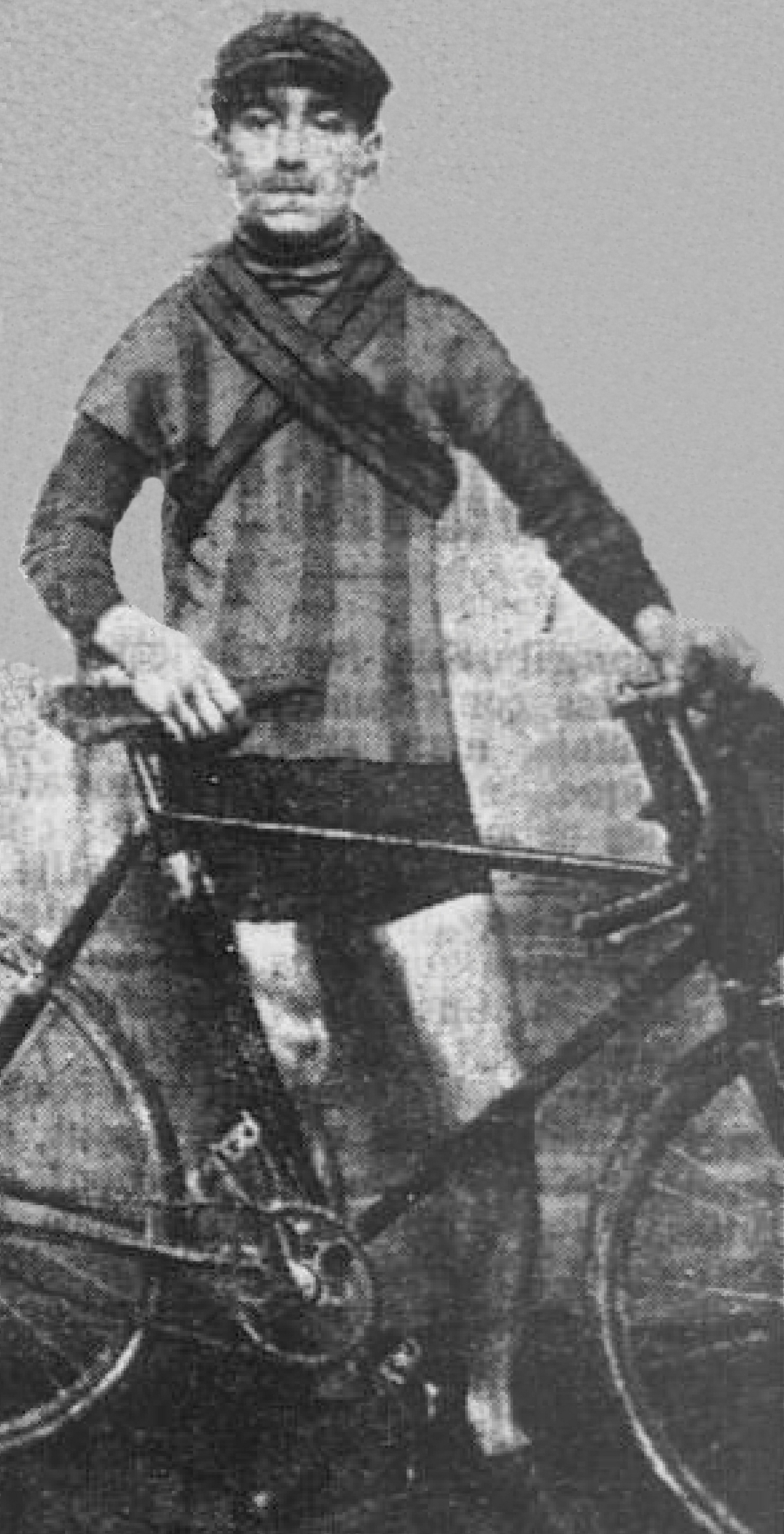 Adolphe Hélière, französischer Radrennfahrer (1891-1910)